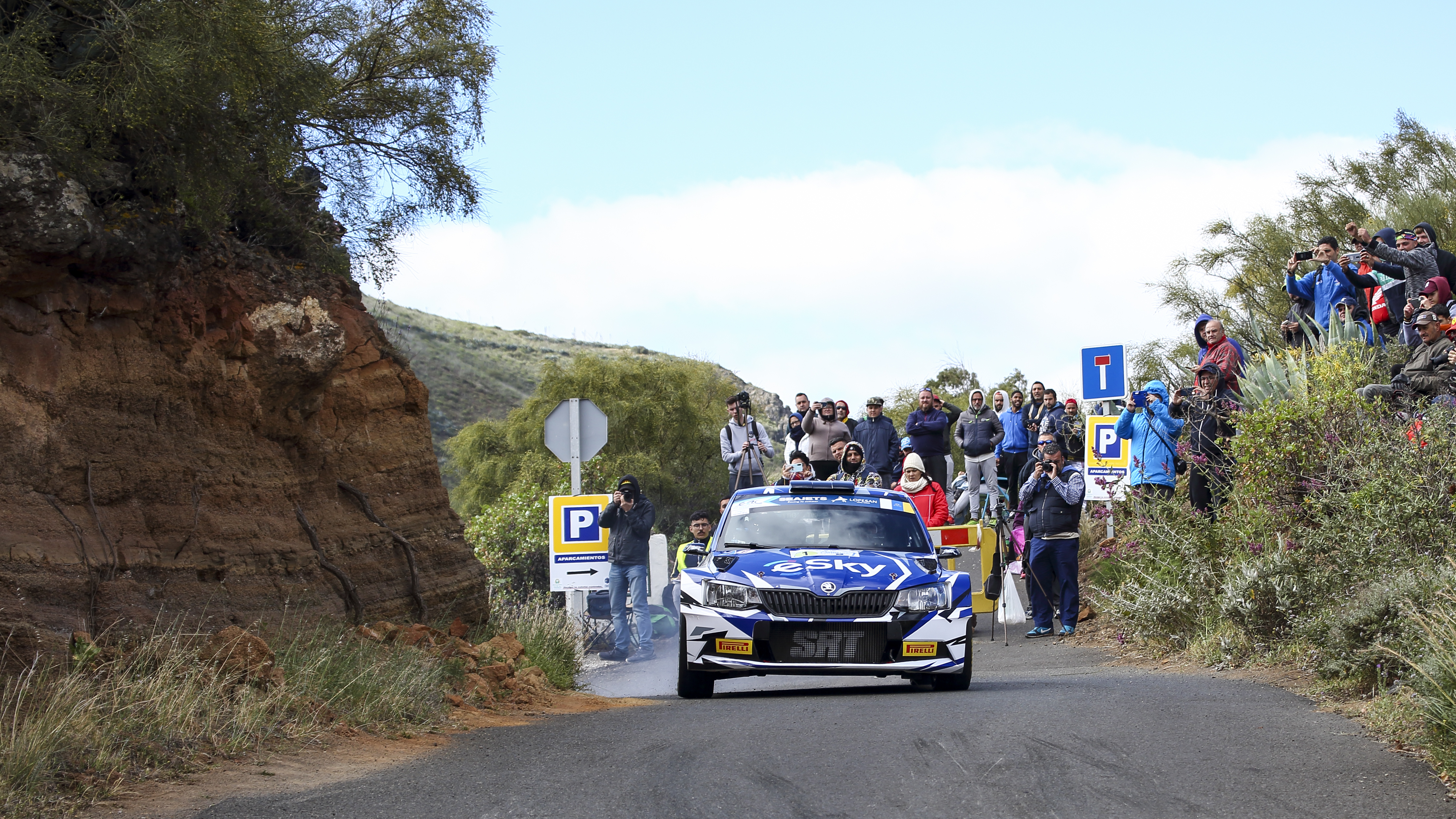 La isla de Gran Canaria volvió a ser, entre los días 2 y 4 de mayo de 2019, punto de encuentro de algunos de los mejores equipos de rallies. Una vez más, el Rally Islas Canarias repitió como la segunda cita de un calendario de ocho pruebas del FIA European Rally Championship, el segundo certamen internacional más importante de esta especialidad.